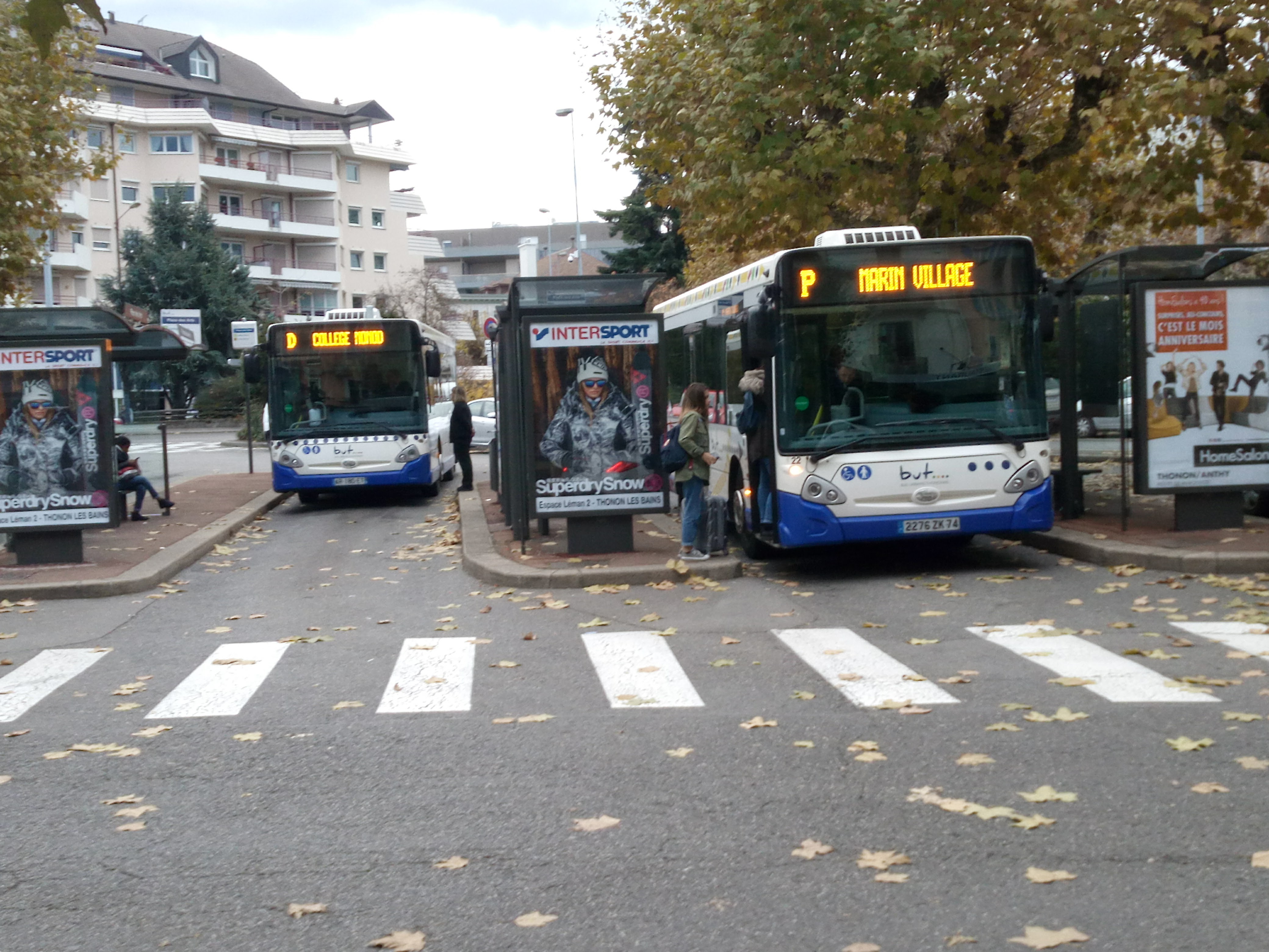 2 Heuliez GX137 en gare routière de Thonon-les-Bains circulant sur les lignes D et P